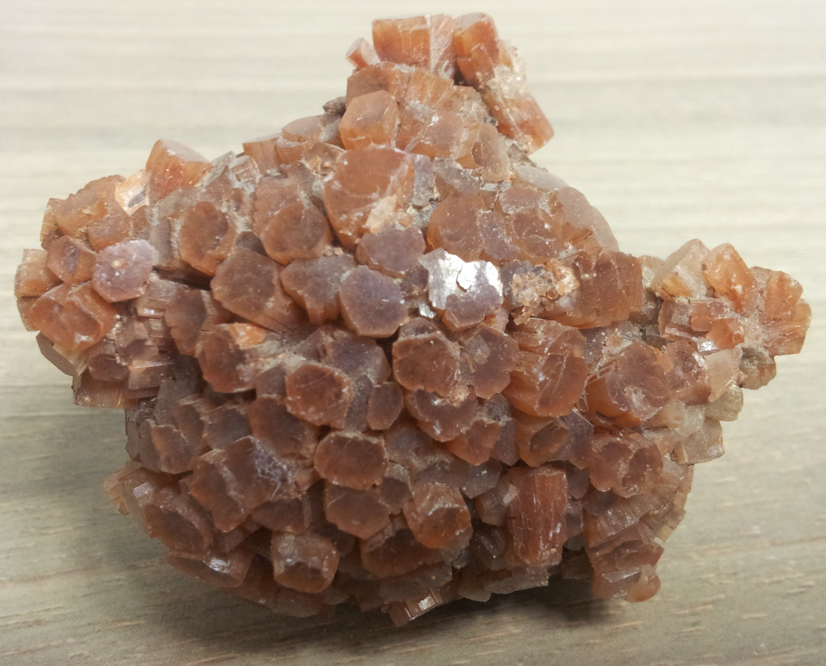 ארגוניט